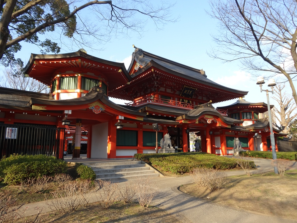 千葉神社（南側）